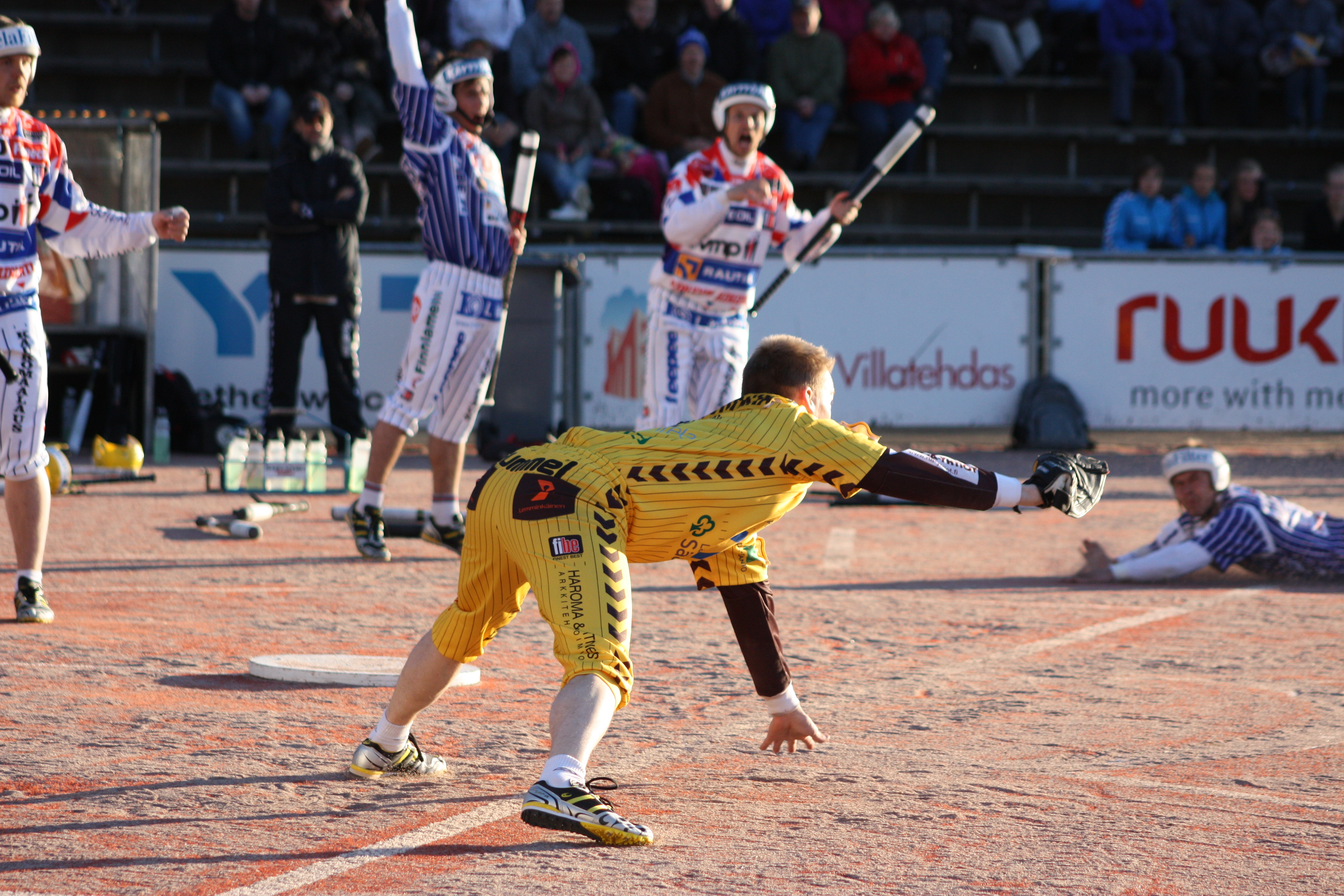 Tahko-Vimpeli 26.5.2011